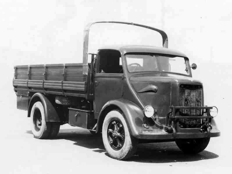 autocarro